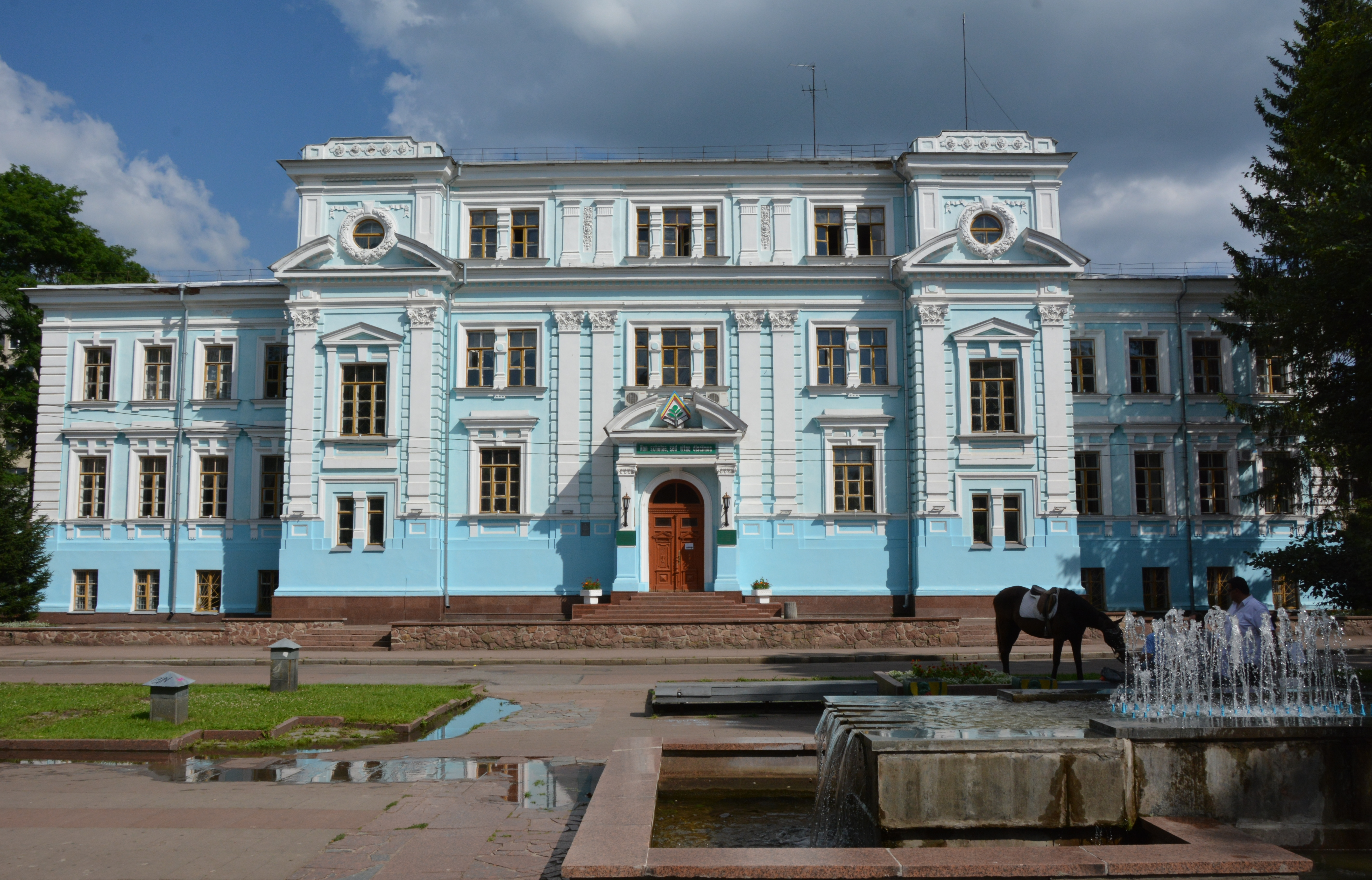 Окружний суд, Житомир, Старий бульвар, 9